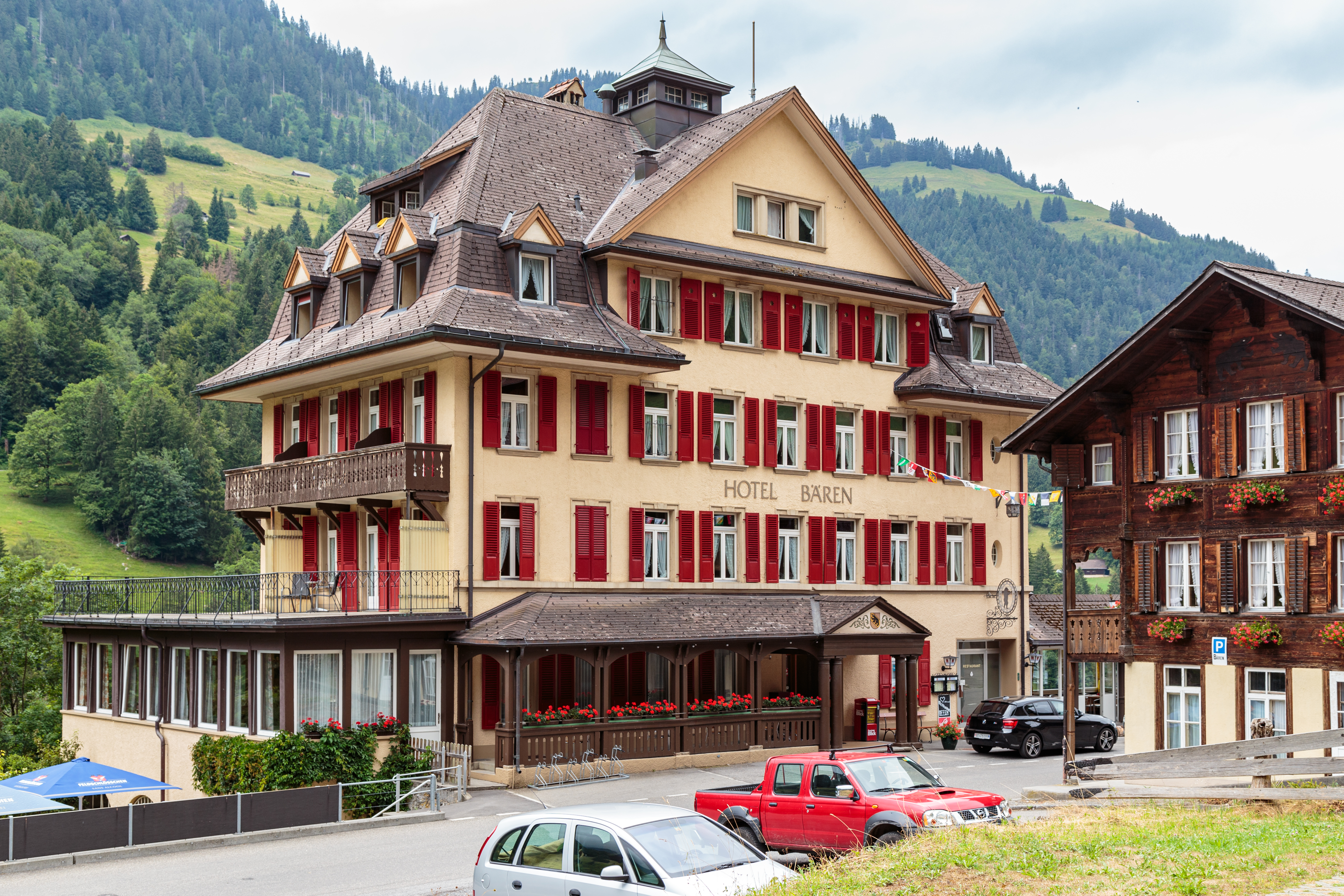 Hotel Bären in Kiental, Tagungsort der 2. Konferenz der Internationalen Sozialisten 1916